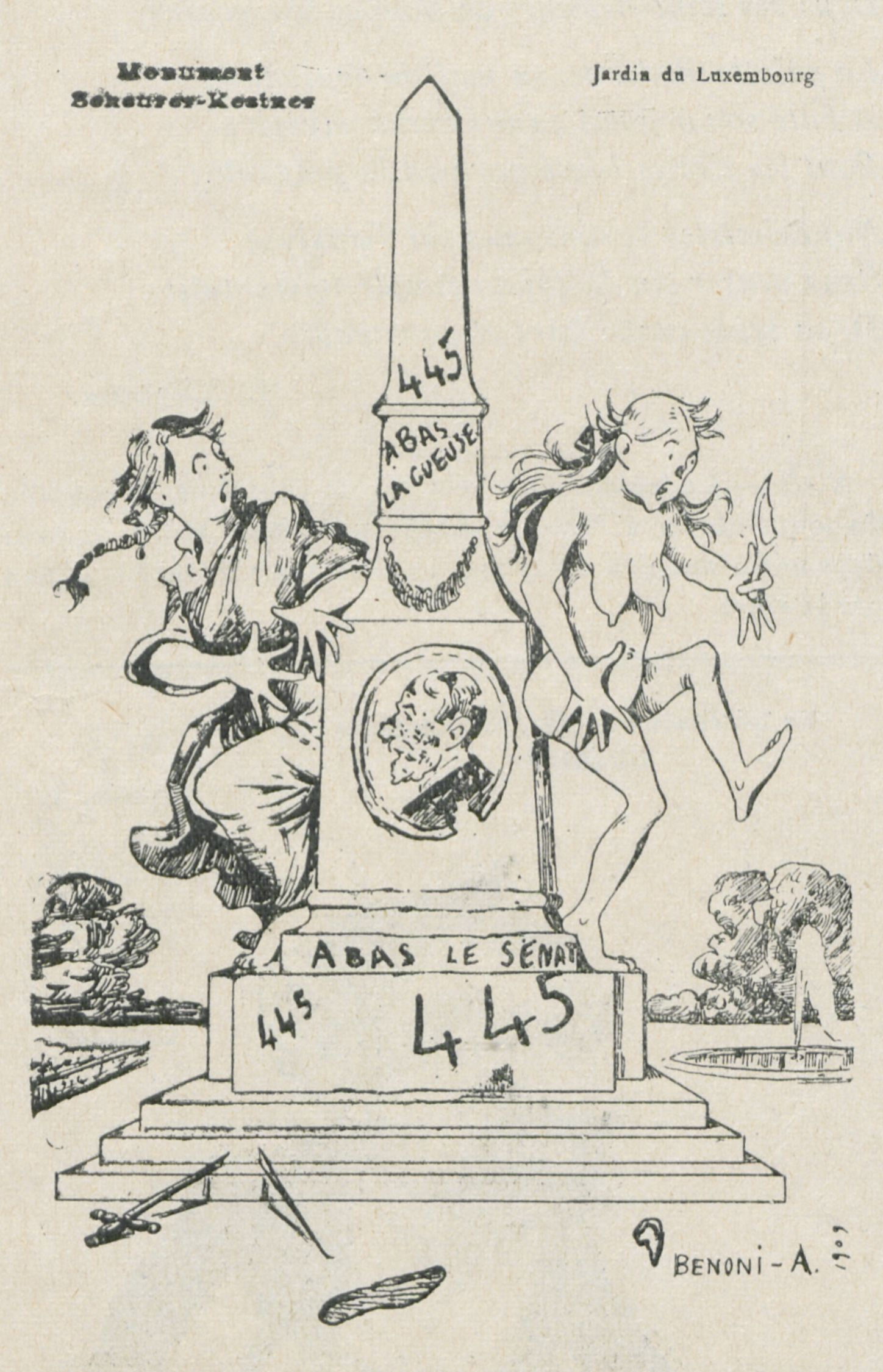 Reproduction d'une carte postale antidreyfusarde de 1909.